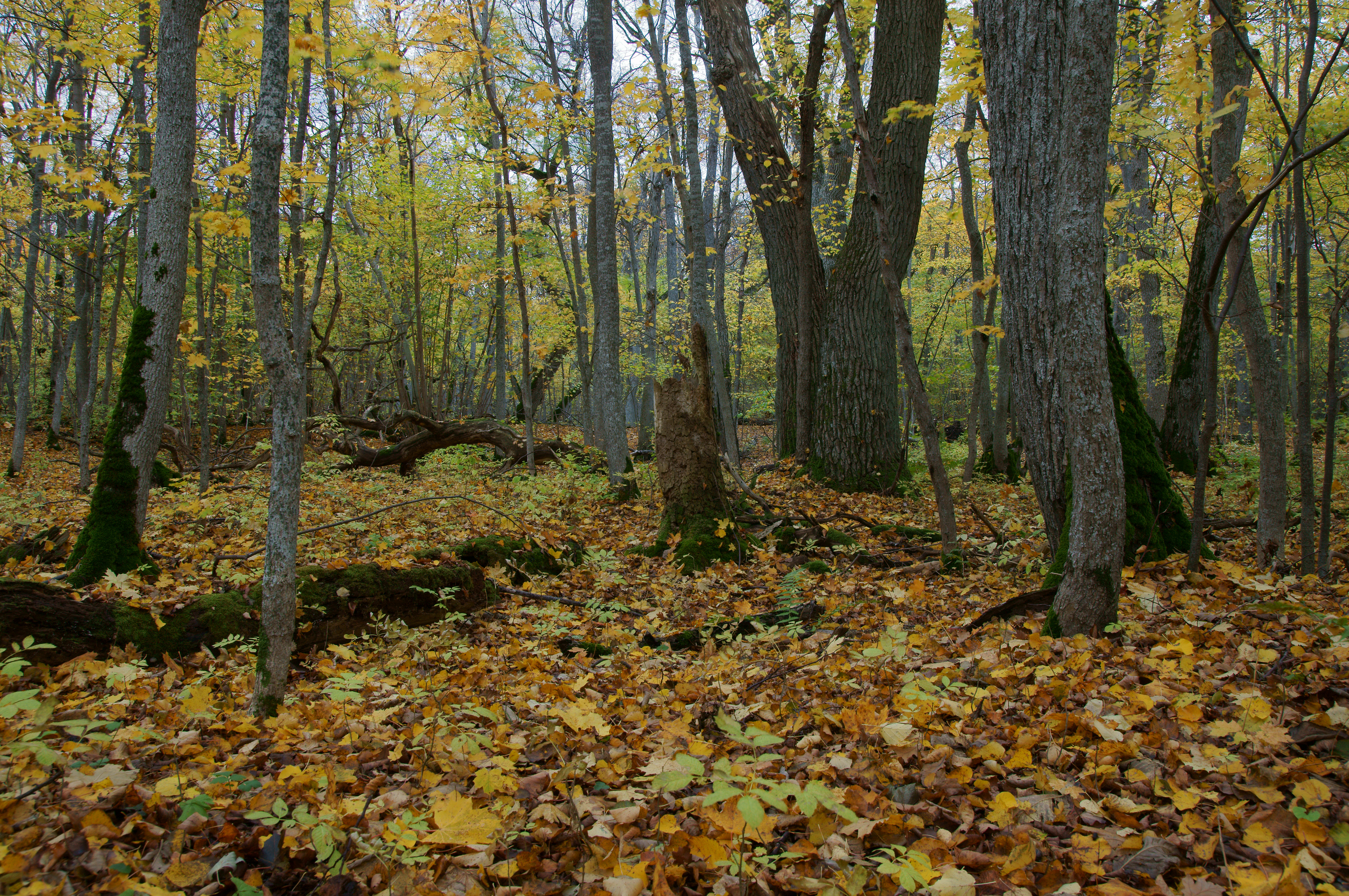 Salumets Puhtulaiul, sügisel